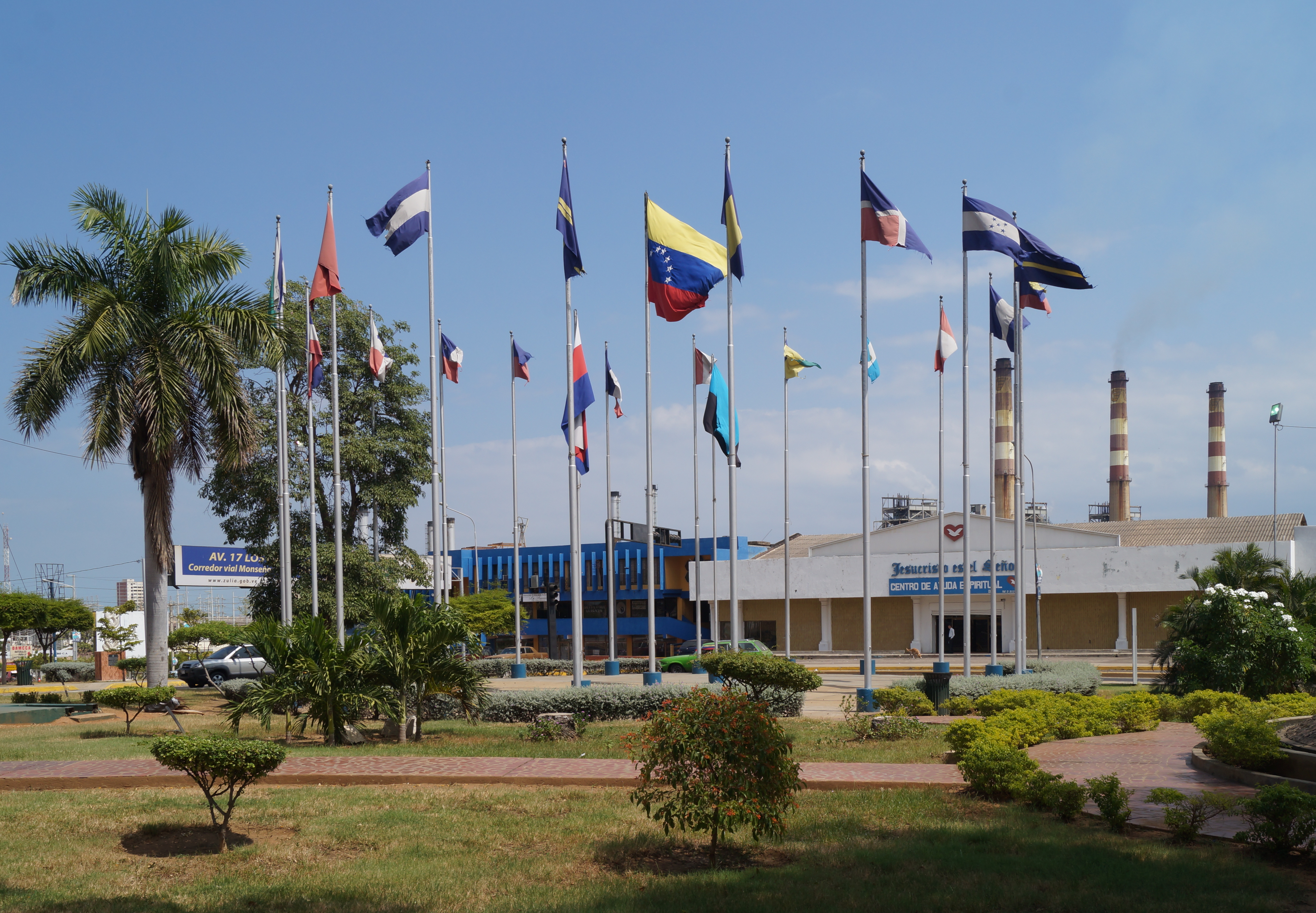 Plaza Las Banderas funge como frontera entre los municipios Maracaibo y San Francisco. Estado Zulia. Venezuela.